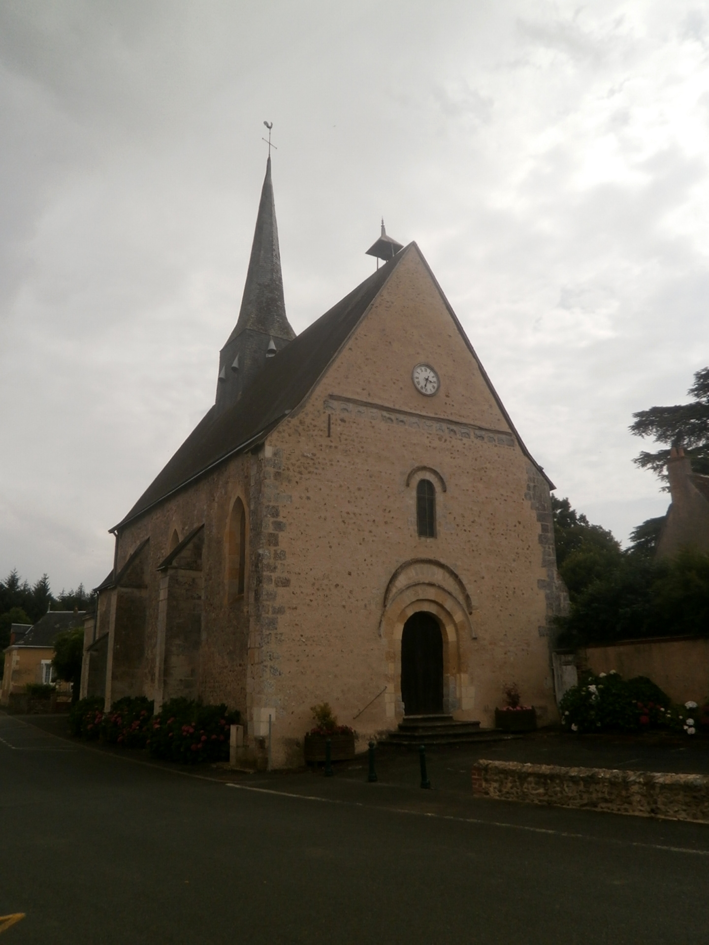 L'église d'Epeigné-sur-Dême